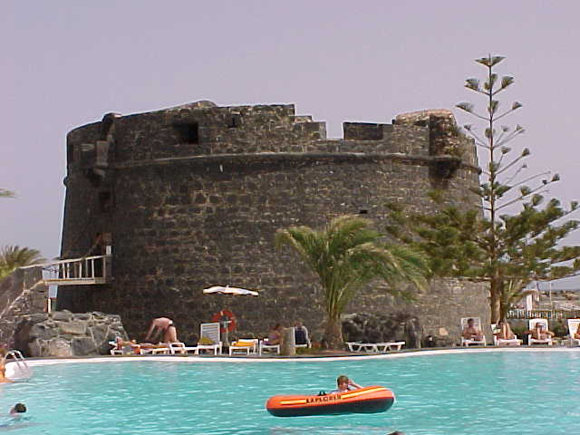 Castillo de Caleta de Fuste, Antigua, Fuerteventura.